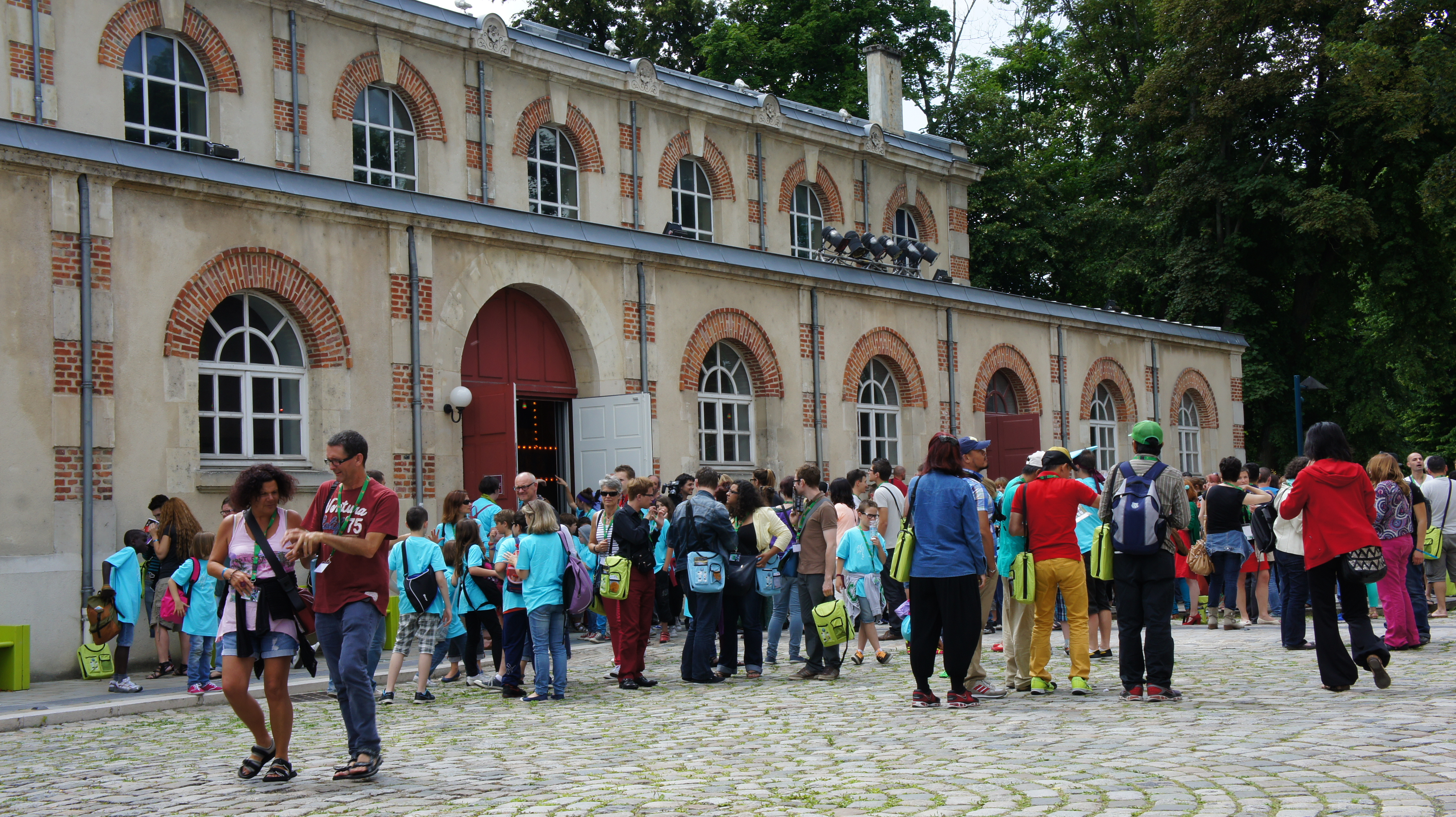 Festival Clin d'oeil 2013, animation au Manège .